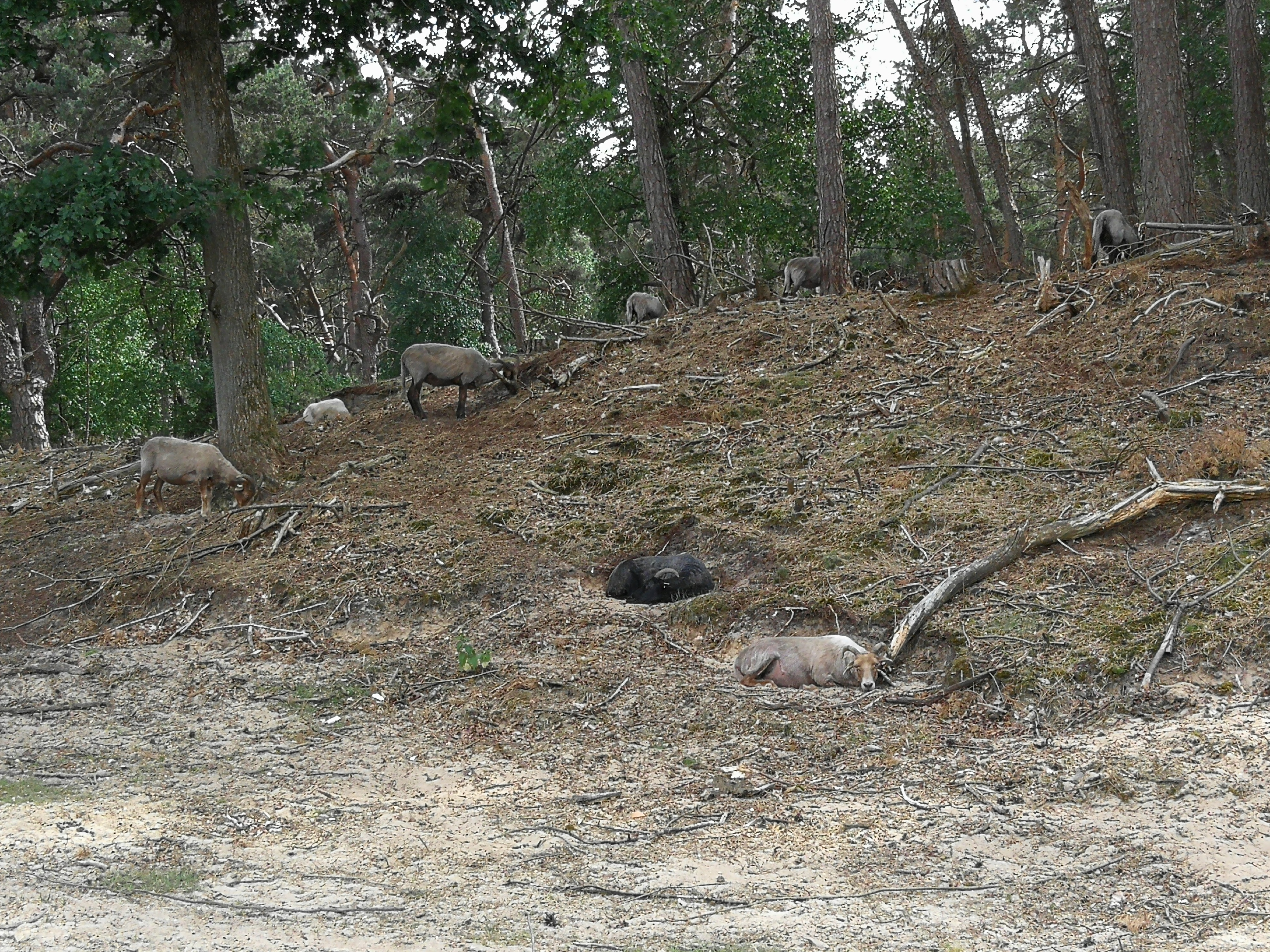 Foto gemaakt in natuurgebied Bornia. Toont schapen uitgezet om de begrazingsdruk te verhogen.